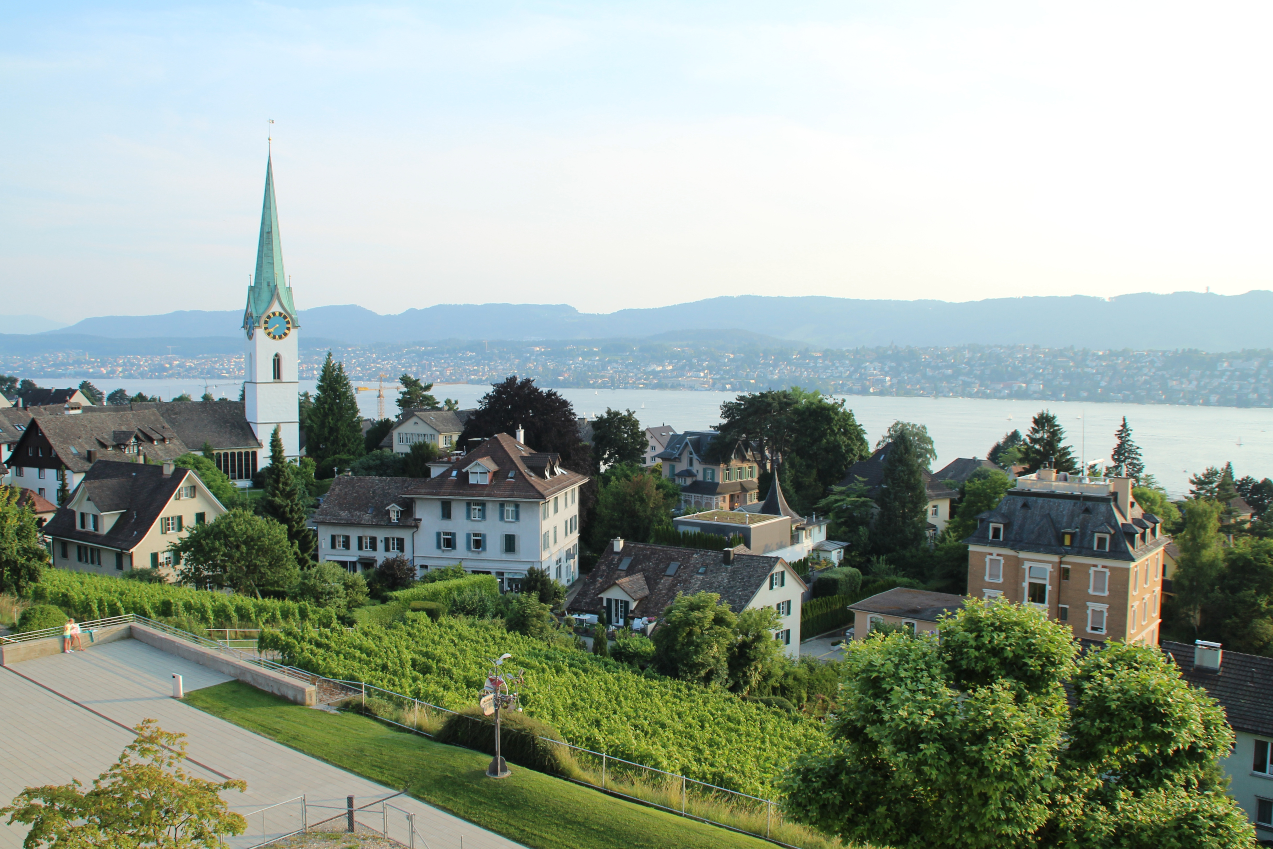 reformierte Kirche Zollikon, Rebberg am Buchholzhügel